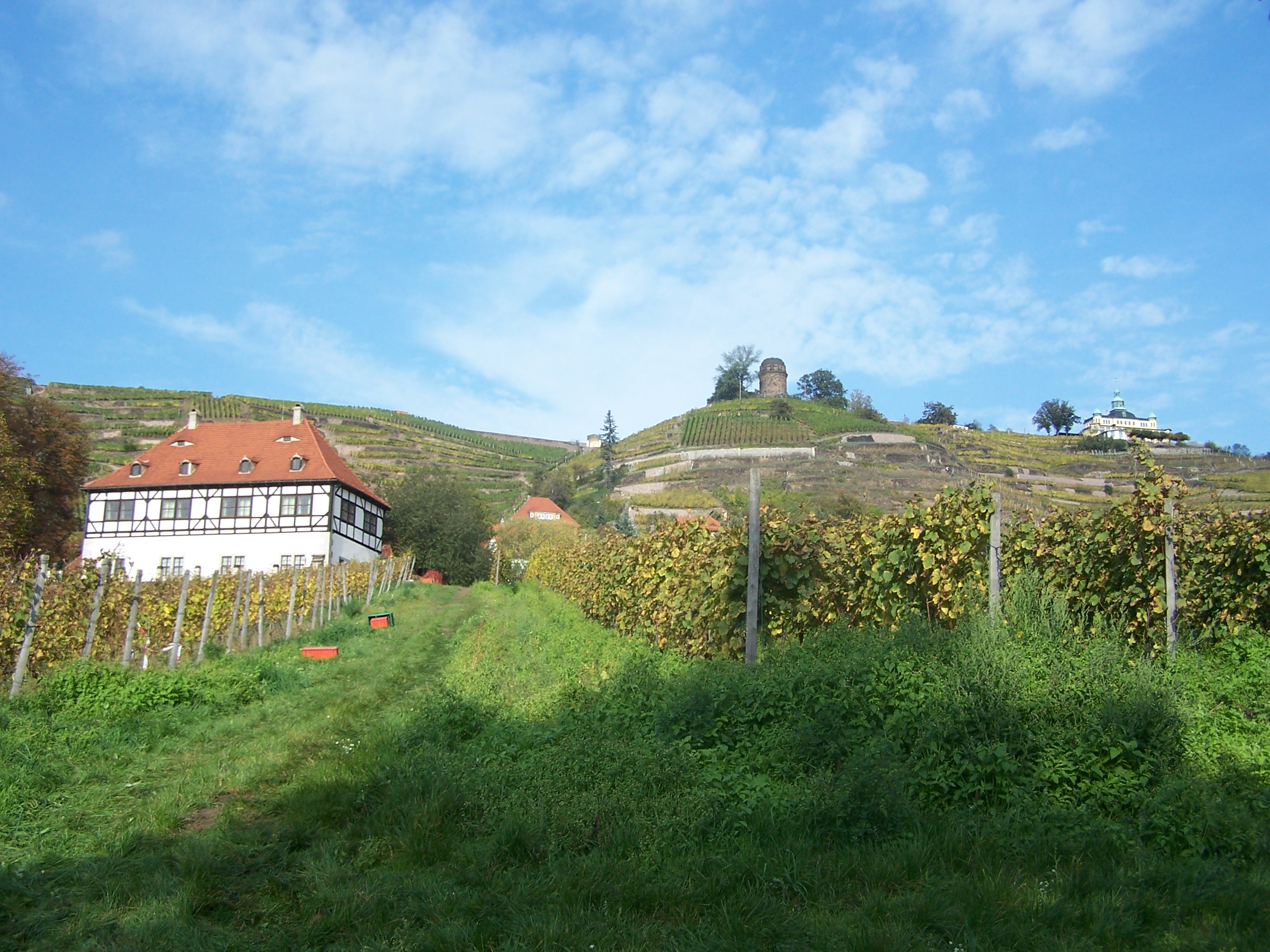 Weinberge am Schloss Hoflößnitz in Radebeul, im Hintergrund Bismarck-Turm und Spitzhaus